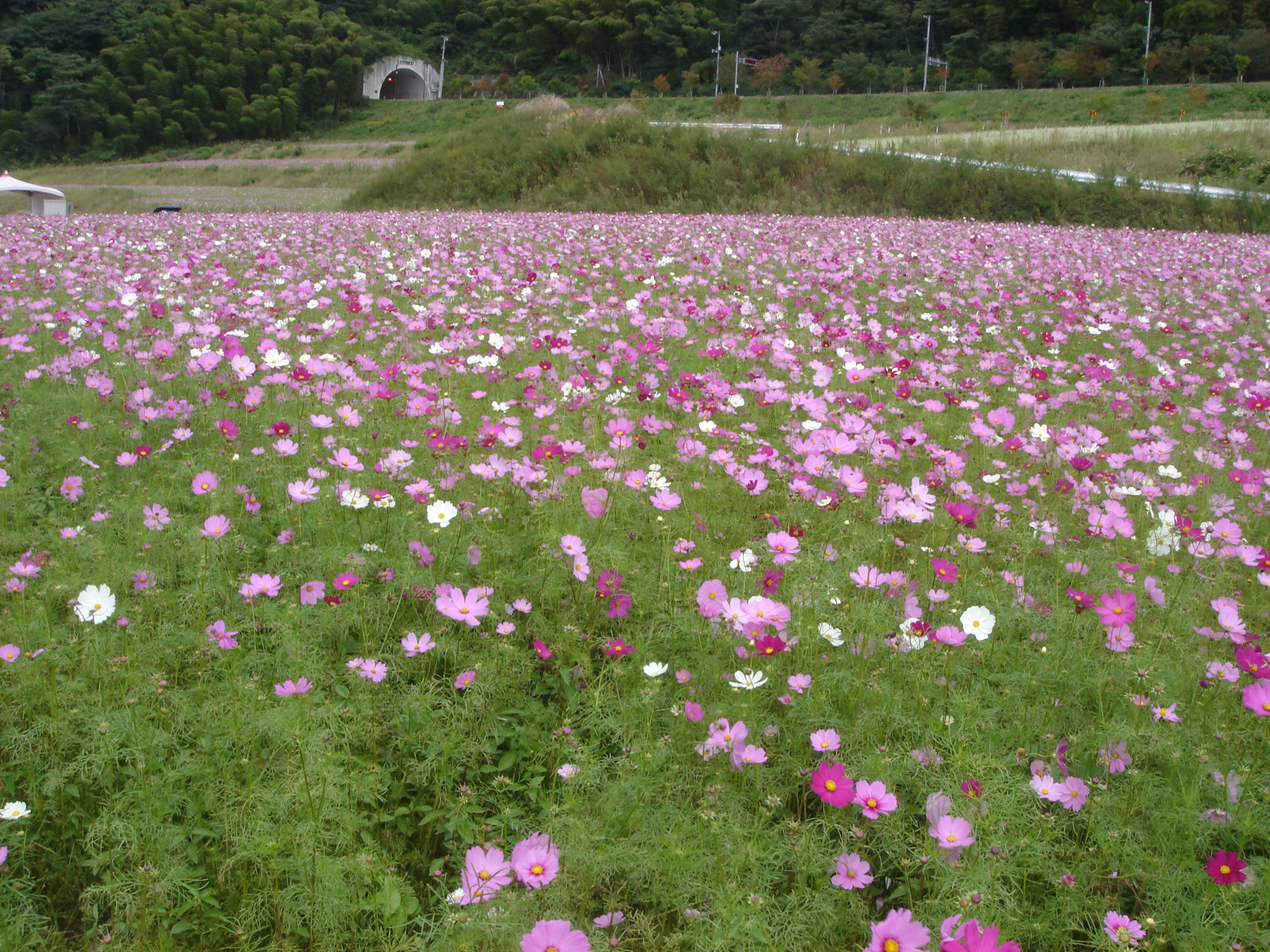 飯南町志津見、国道184号線沿いのコスモス。